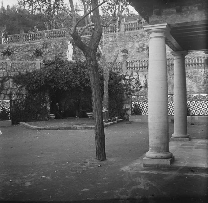 A la font del Gat de Montjuïc. Josep Salvany i Blanch (1920)